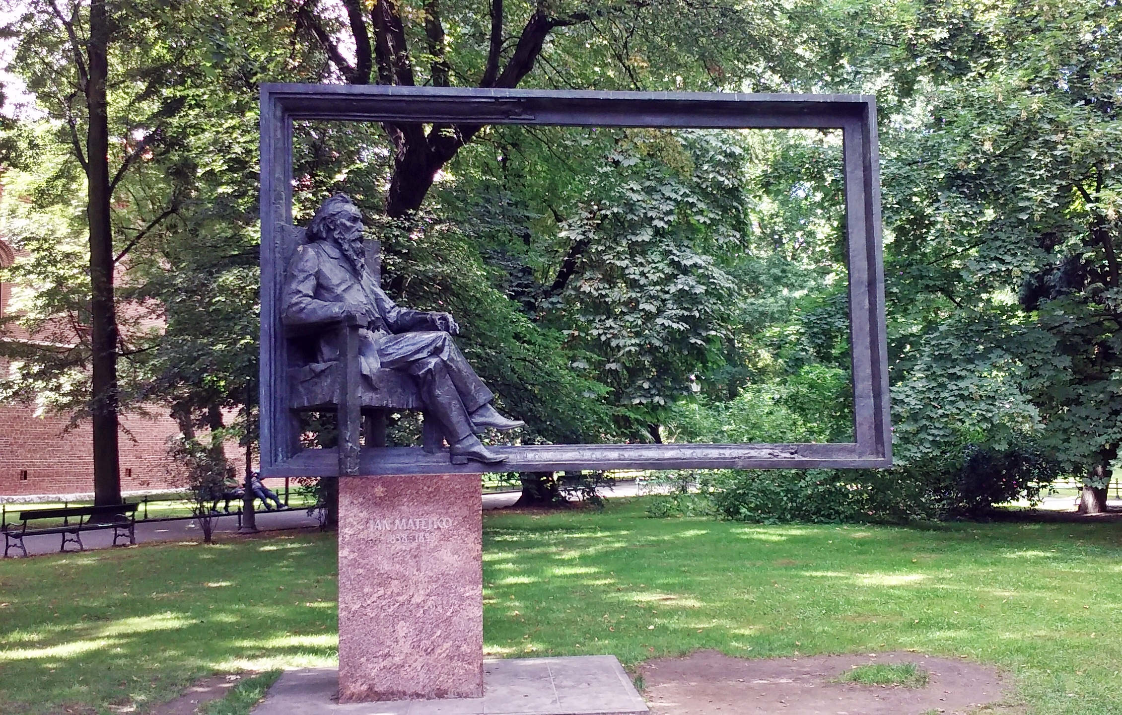 Pomnik Jana Matejki